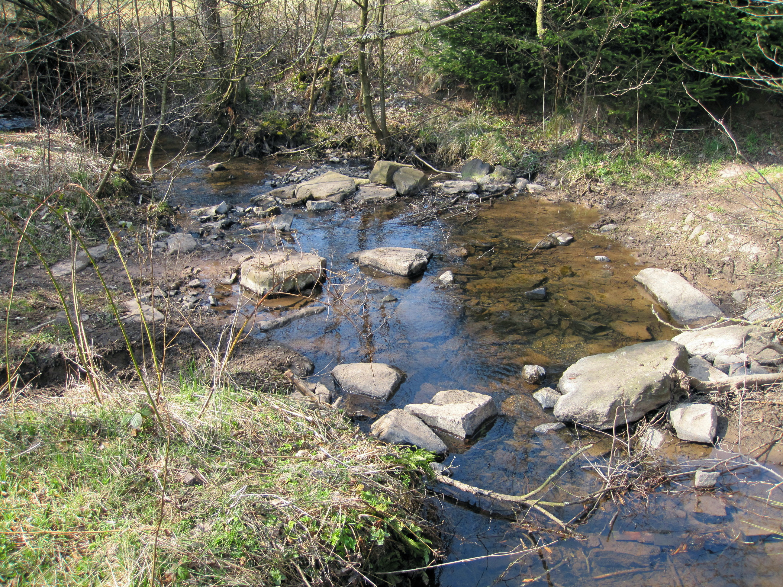 Furt am Manscheider Bach